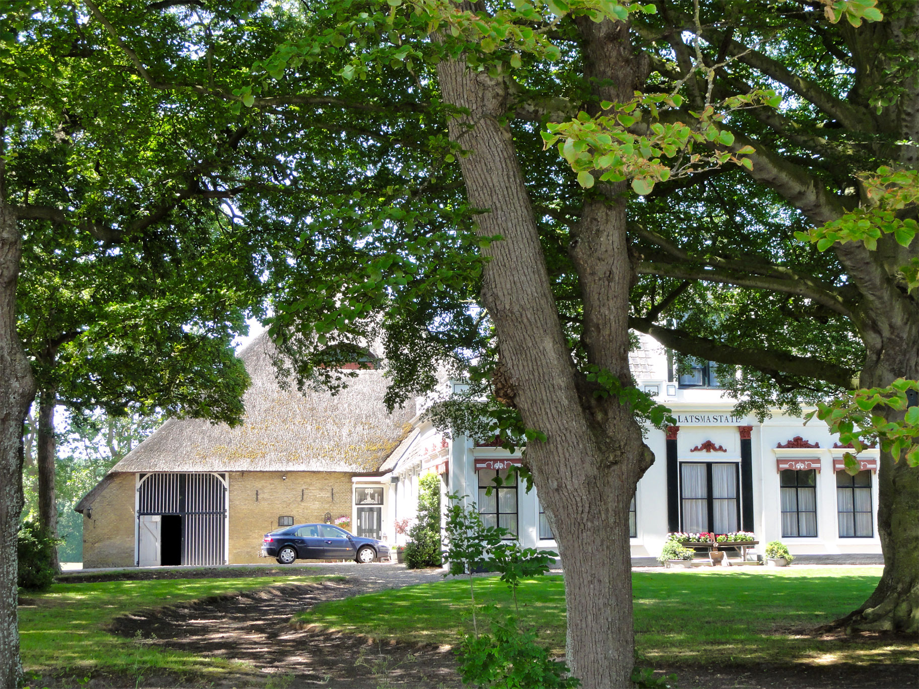 Latsmastate nabij Sexbierum